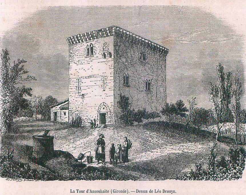 Gravure :Tour d'Ansouhaite (Drouyn), 1862